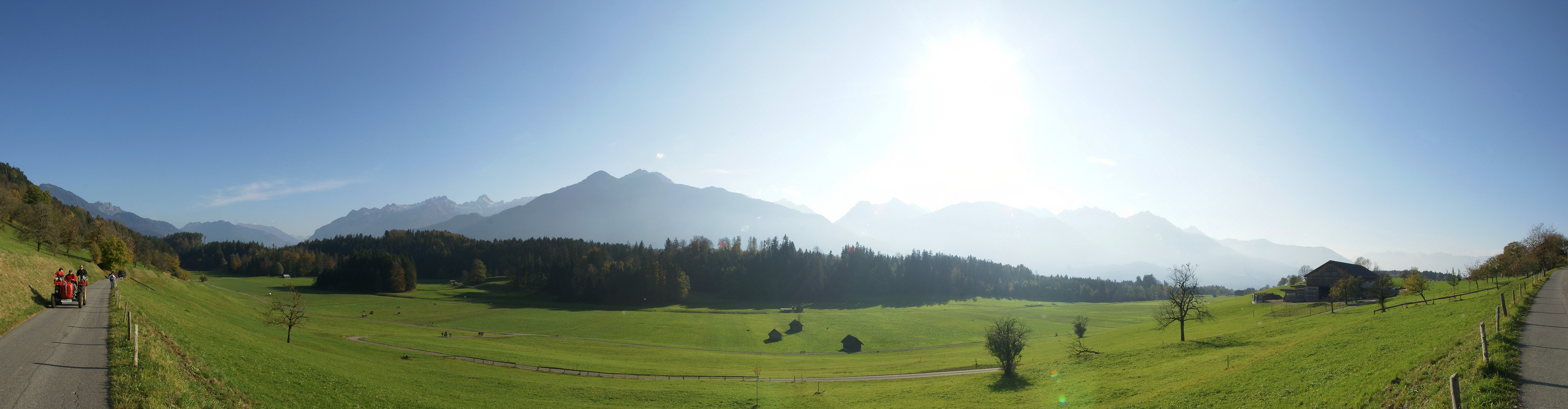 Blick von der Bludescherstraße in Schnifis über die Untere Halde zu den Bergen des Rätikon.